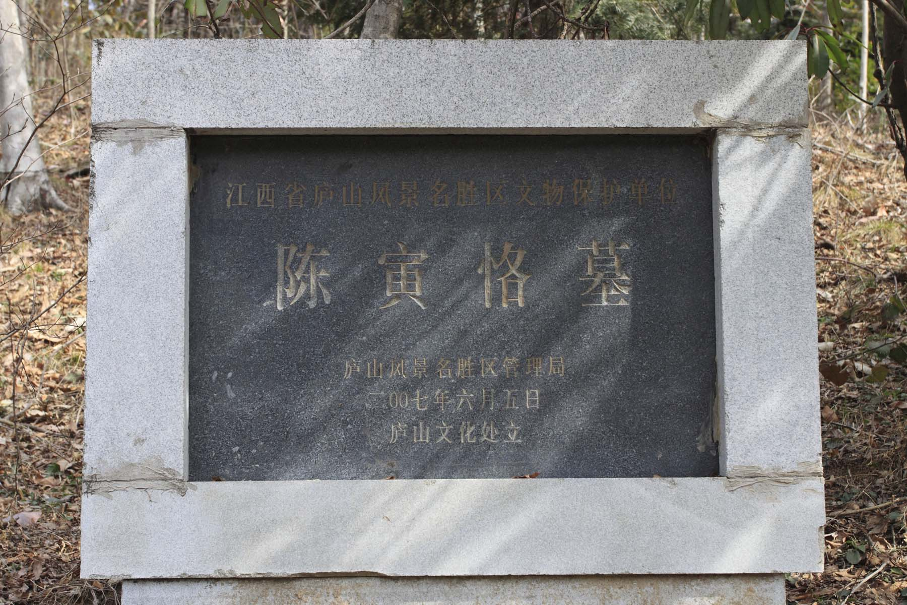 位于庐山植物园内的陈寅恪墓，庐山风景名胜区文物保护单位